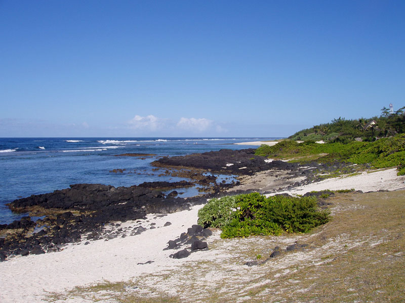 Ostküste von Mauritius